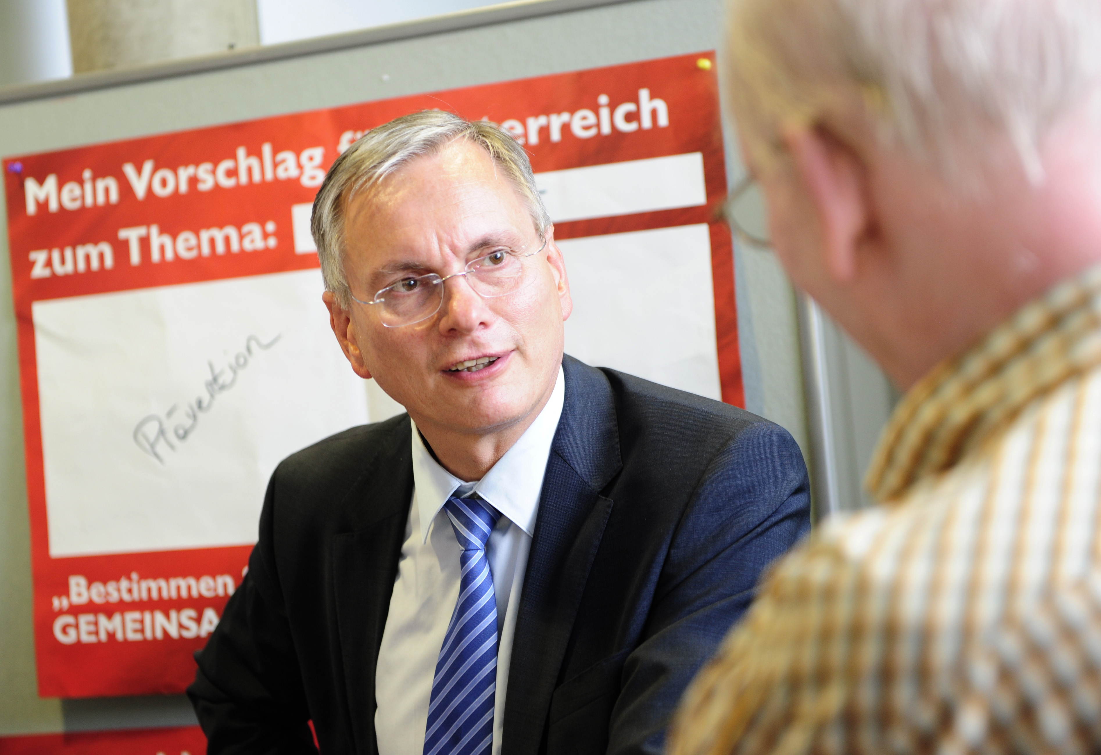 Im Rahmen der SPÖ Dialogforen findet im Linzer Ars Electronica Center eine Diskussionsveranstaltung zum Thema Gesundheit unter Mitwirkung von Gesundheitsminister Alois Stöger statt.